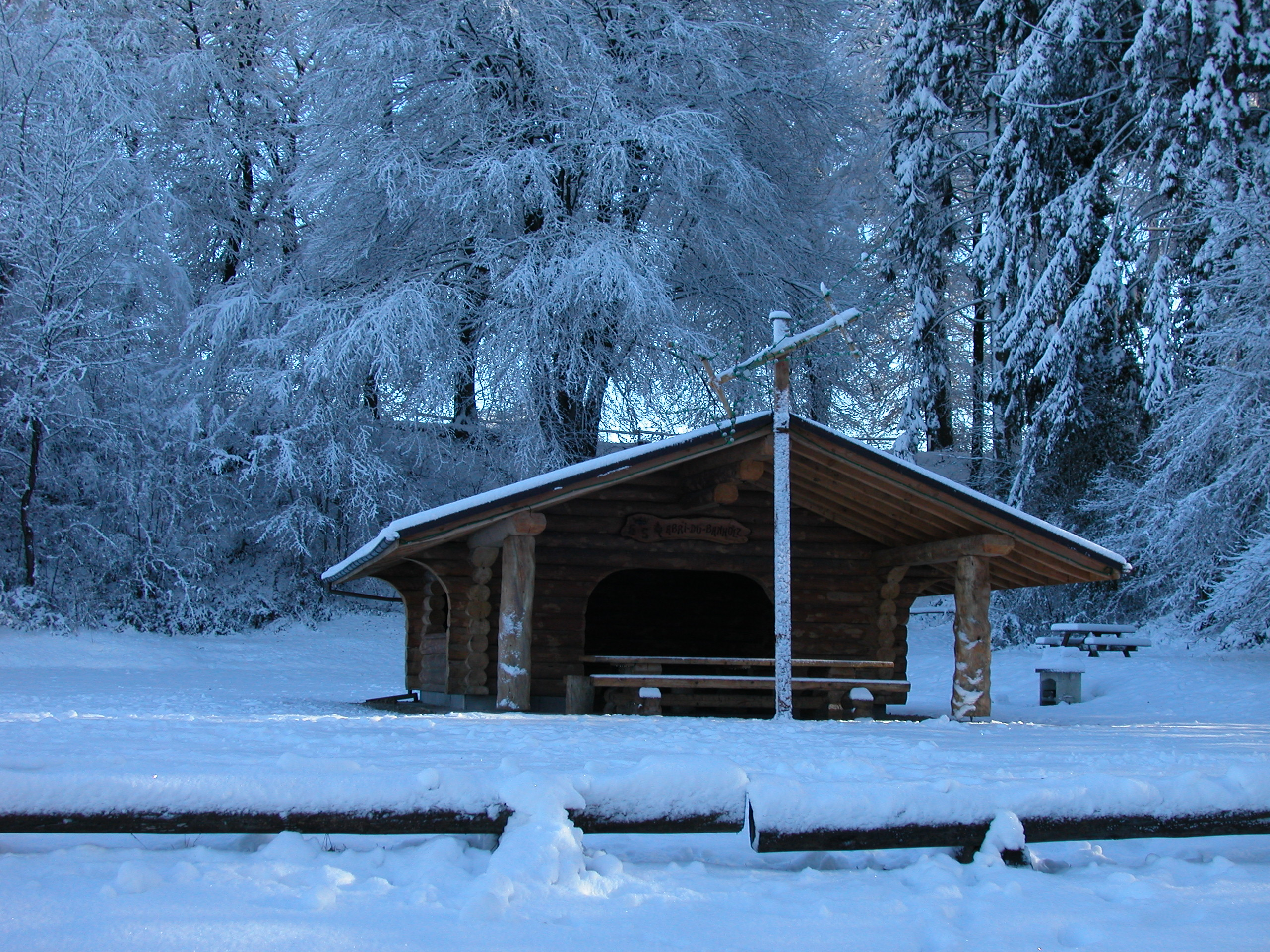 Le chalet du Banholz est situé en haut de la rue de Ferrette.